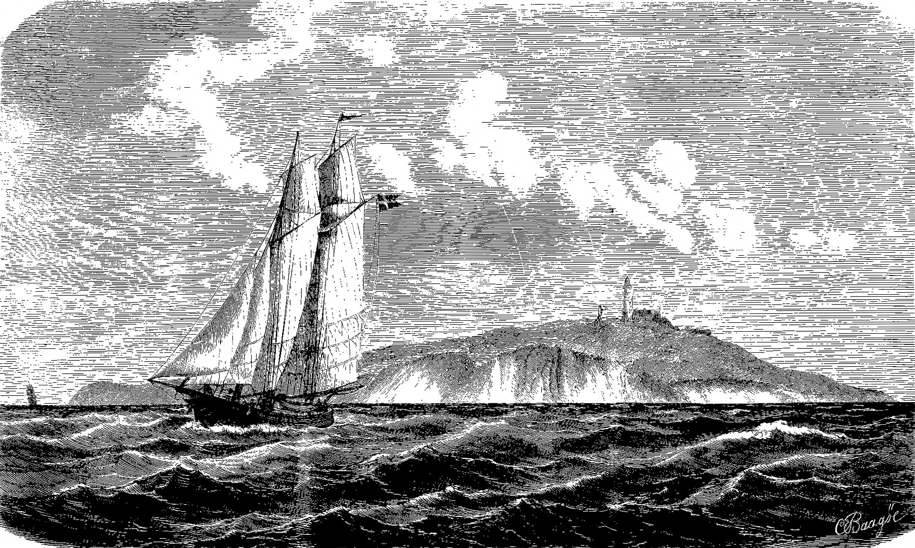 Øen Hjelm. Af den Borg, Marsk Stig Andersen Hvide i Aaret 1290 opførte her, er nu kun Voldstedet tilbage.